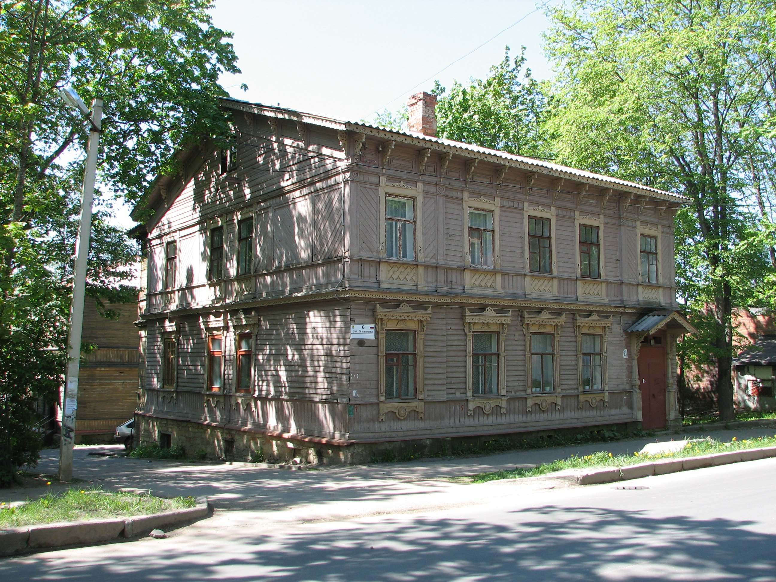 Жилой дом. Улица Чкалова, 6, Гатчина